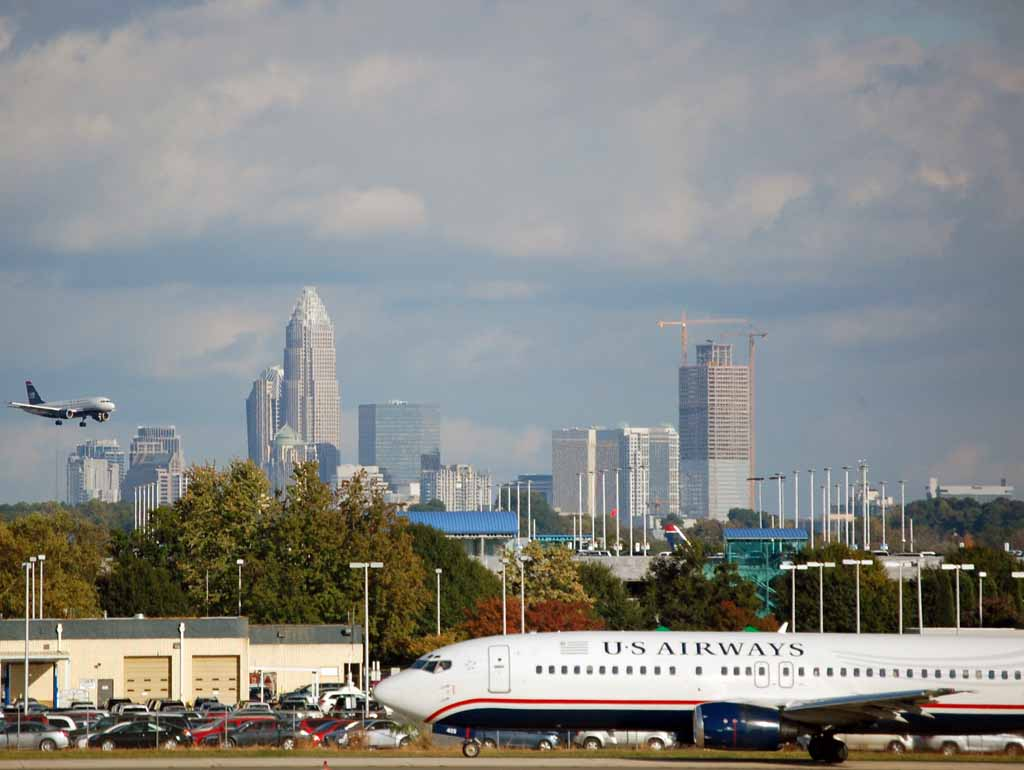 Visit